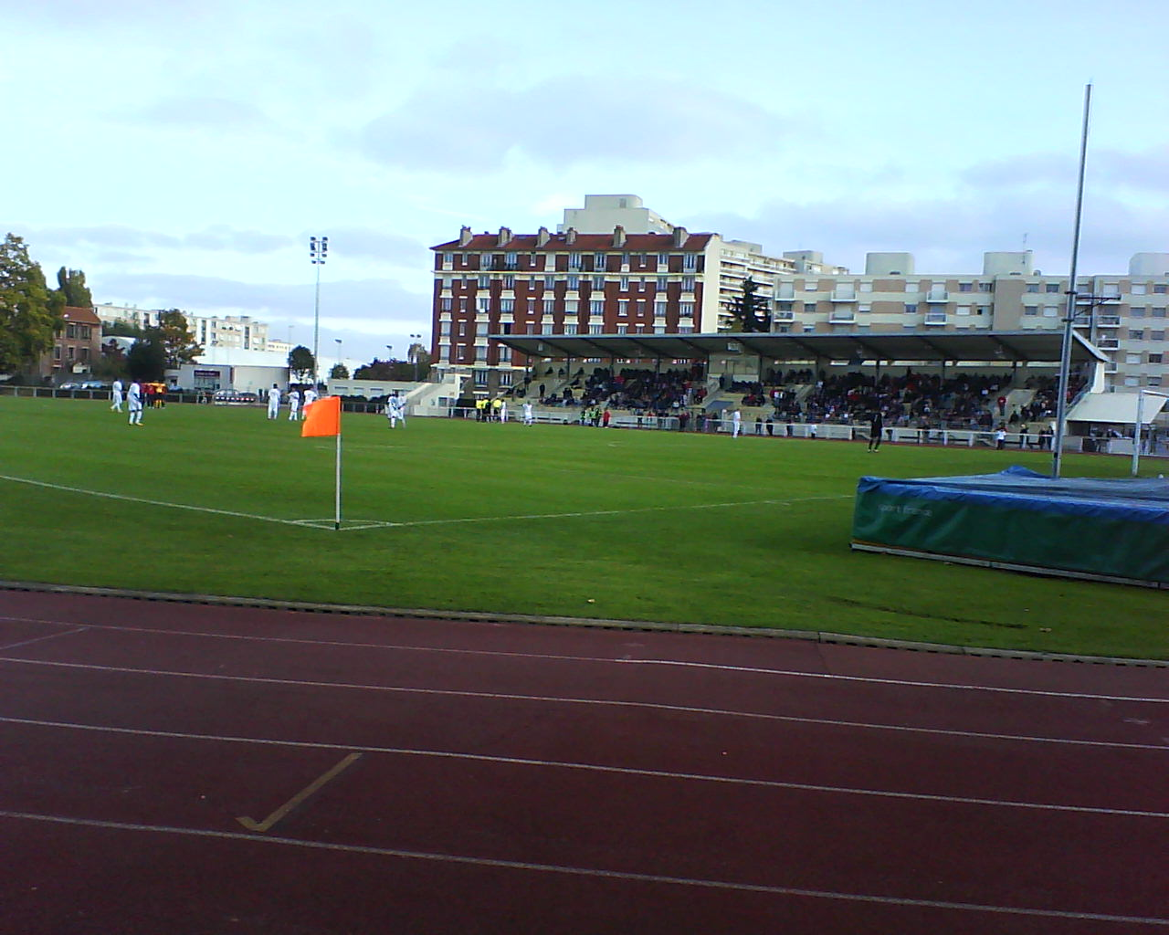 Vue d'ensemble du stade Auguste-Delaune de Maisons-Alfort lors du match France-Norvège des moins de 16 ans du 28 octobre 2010 comptant pour le tournoi du Val-de-Marne